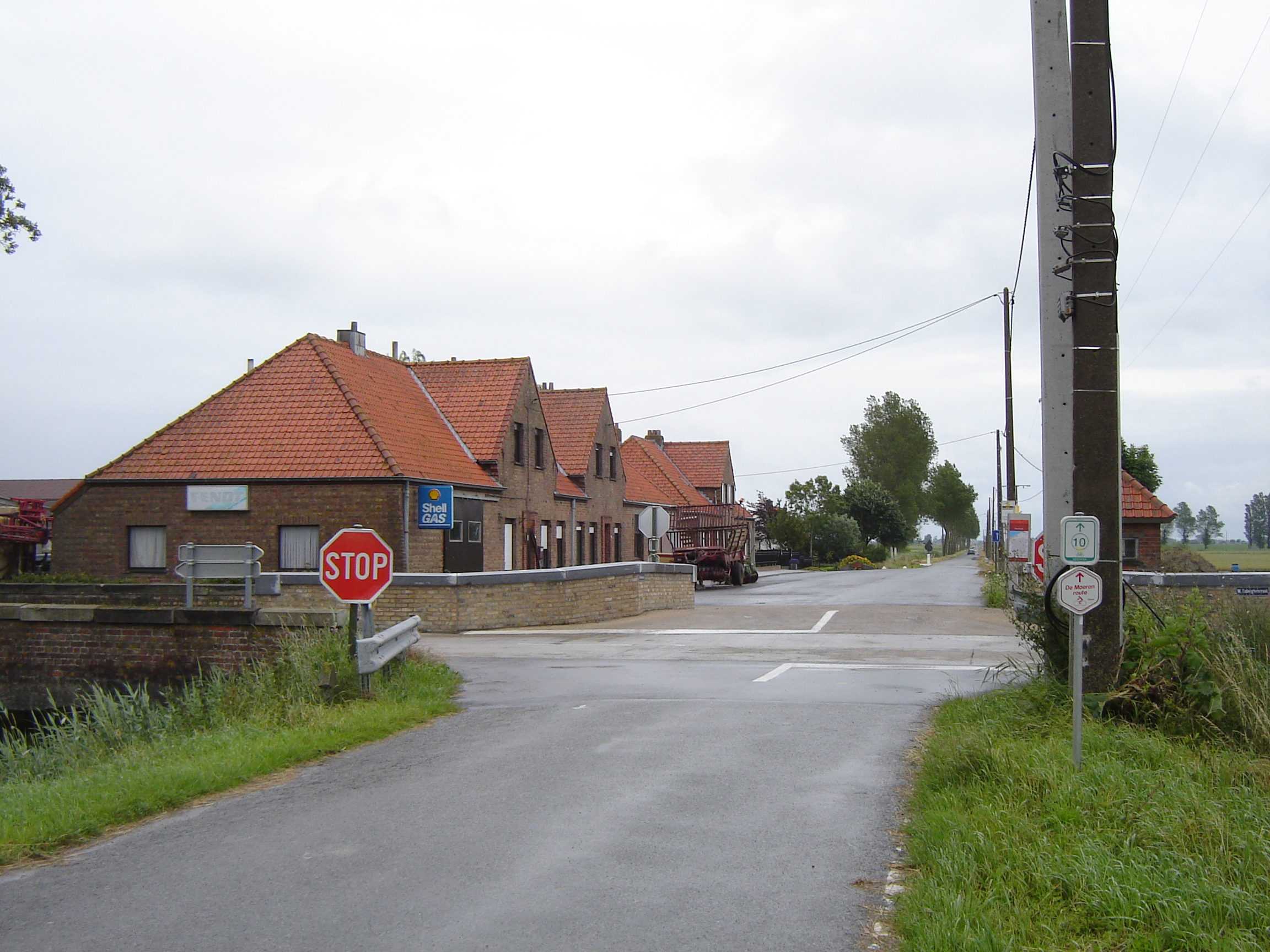 Uitzicht op kruispunt Moeresmisse (W. Cobergherstraat en Noordmoerstraat). De deelgemeente heeft geen echte dorpskom; in dit kleine gehuchtje was vroeger het gemeentehuis gevestigd. View on the intersection Moeresmisse (W Cobergherstraat and Noordmoerstraat streets). The former municipality does not have a real village centre; the town hall was located in this tiny hamlet. De Moeren, Veurne, Belgium